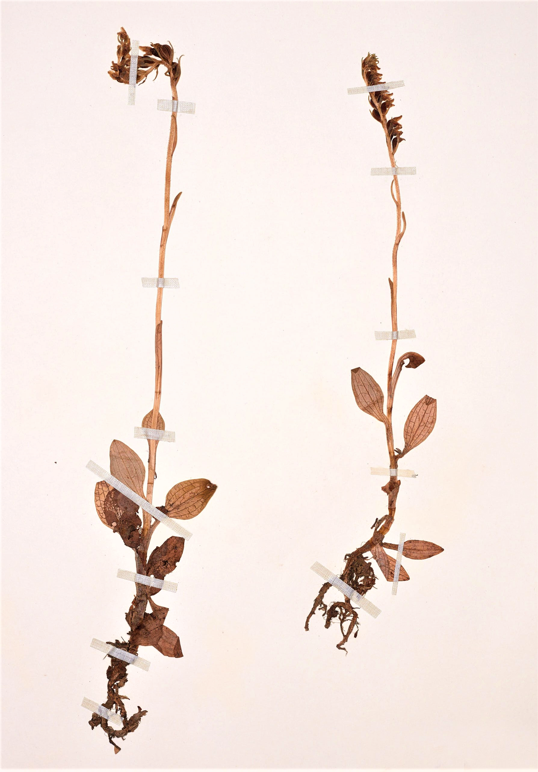 Cretz.: Exsikat von Goodyera repens (1937)